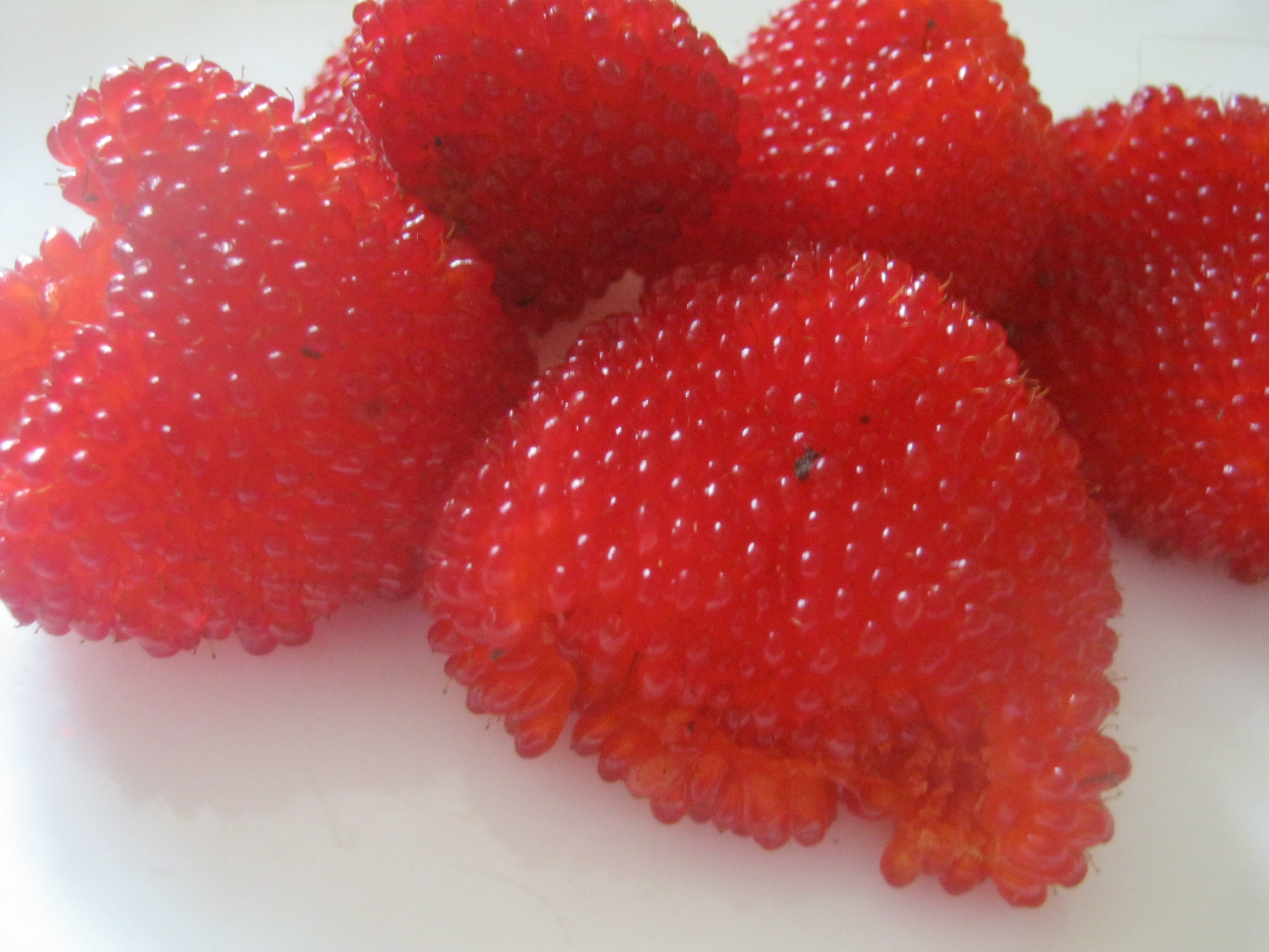 Žemuoginė avietė